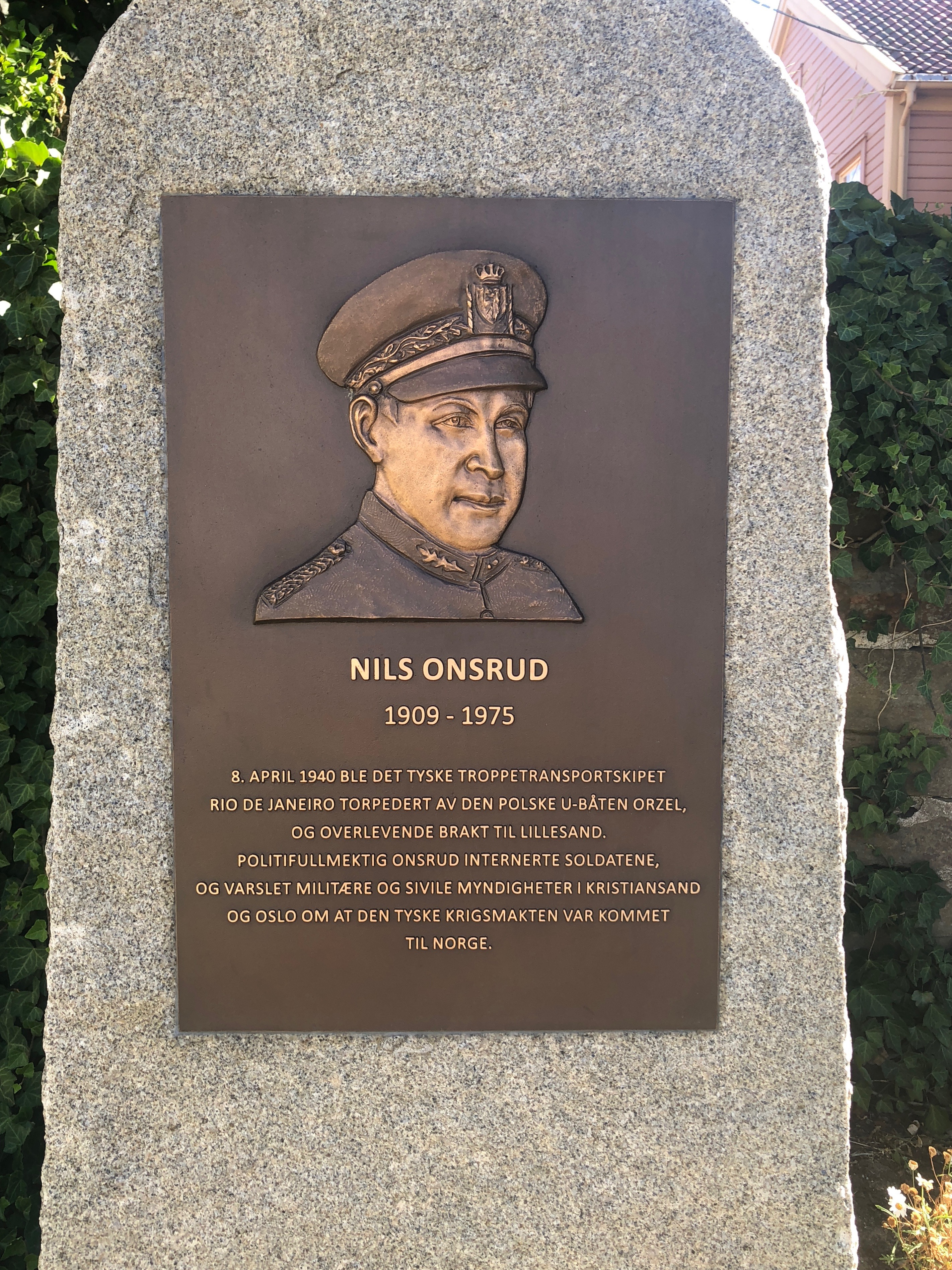 Minnesmerke over Nils Onsrud i Lillesand